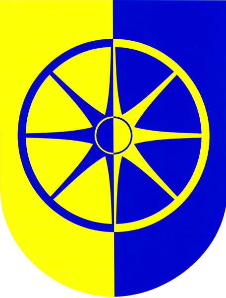 Znak obce Ráječko